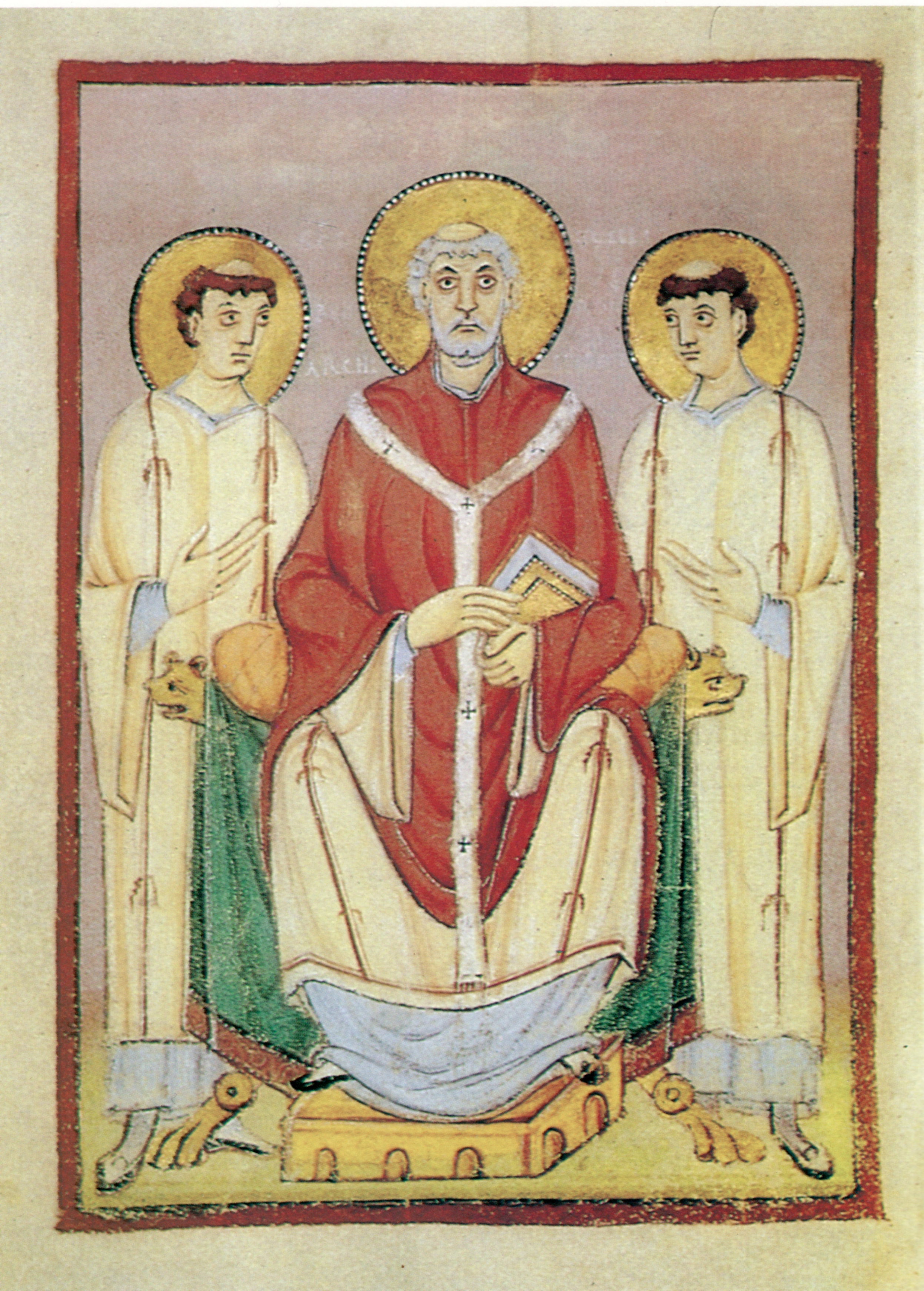 Der Heilige Willibrord. Buchmalerei, Trier um 1000. Einzelblatt. (Paris, Bibliothèque National, Lat. 10510)